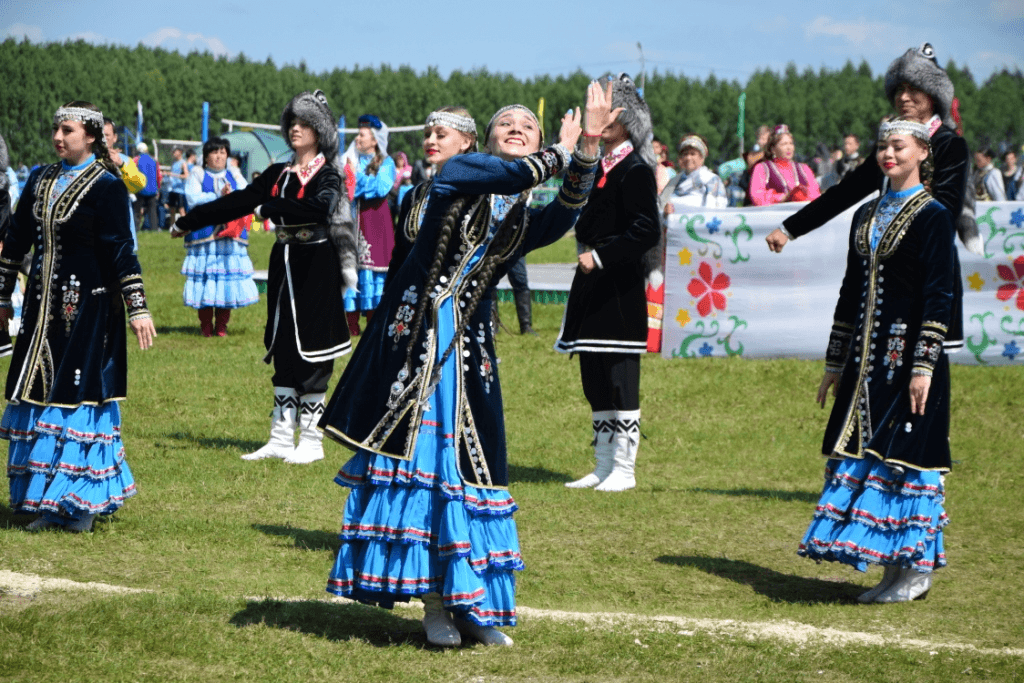 Среди почетных гостей присутствовали исполняющий обязанности министра финансов Республики Башкортостан Игтисамова Лира Закуановна, первый секретарь Республиканского комитета коммунистической партии РФ Кутлугужин Юнир Галимьзянович, депутат Государственного Собрания – Курултая Республики Башкортостан Низаметдинов Рамзил Равилович и др.